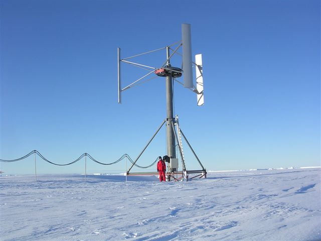 H-Rotor Neumayer Station, Antarktis